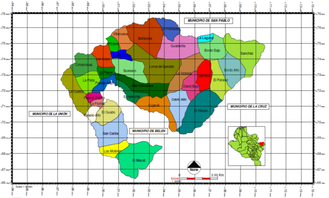 División Politica Colón Génova